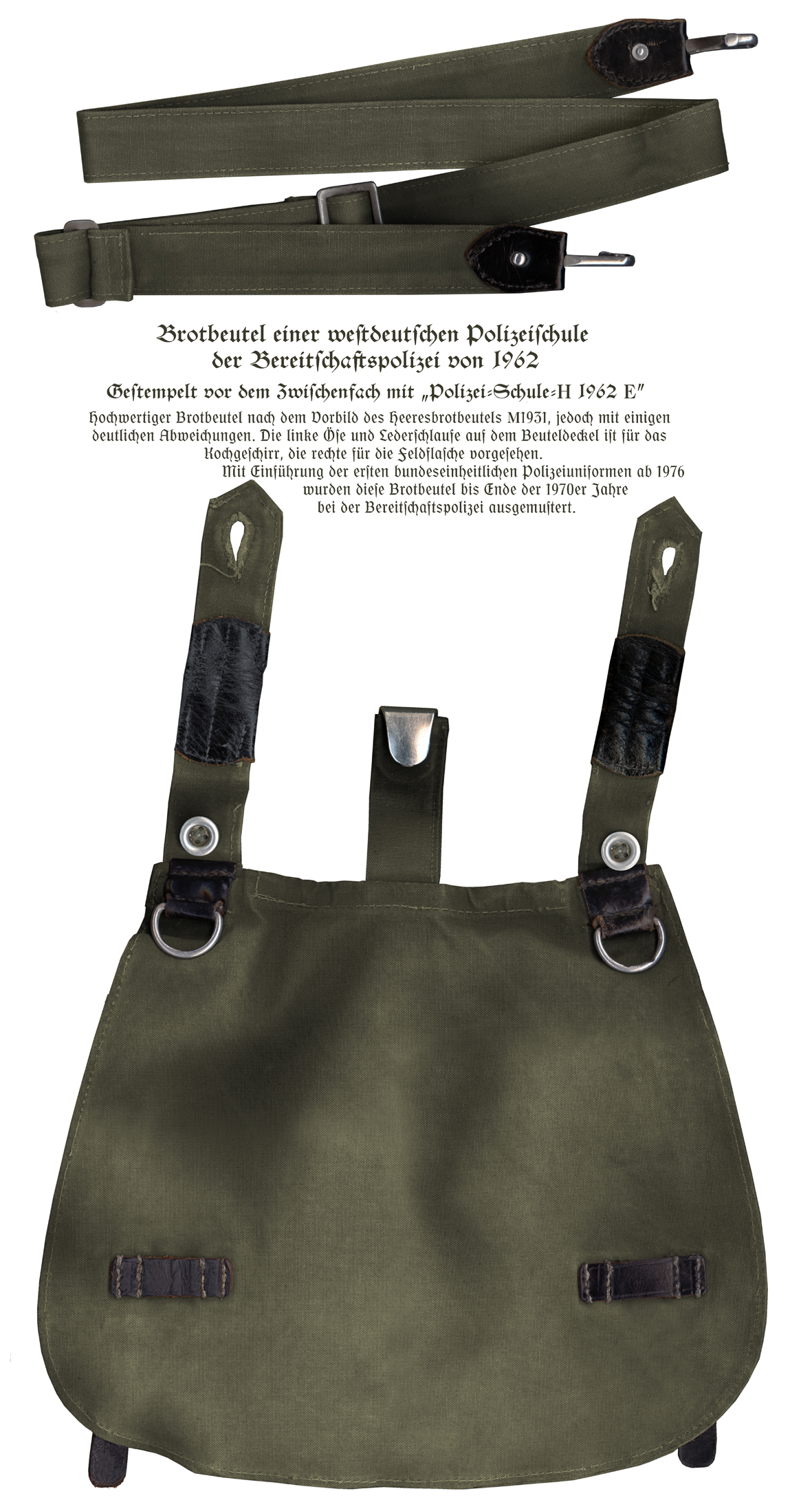 Brotbeutel einer westdeutschen Polizeischule von 1962. Bread bag of a West German police school of 1962.